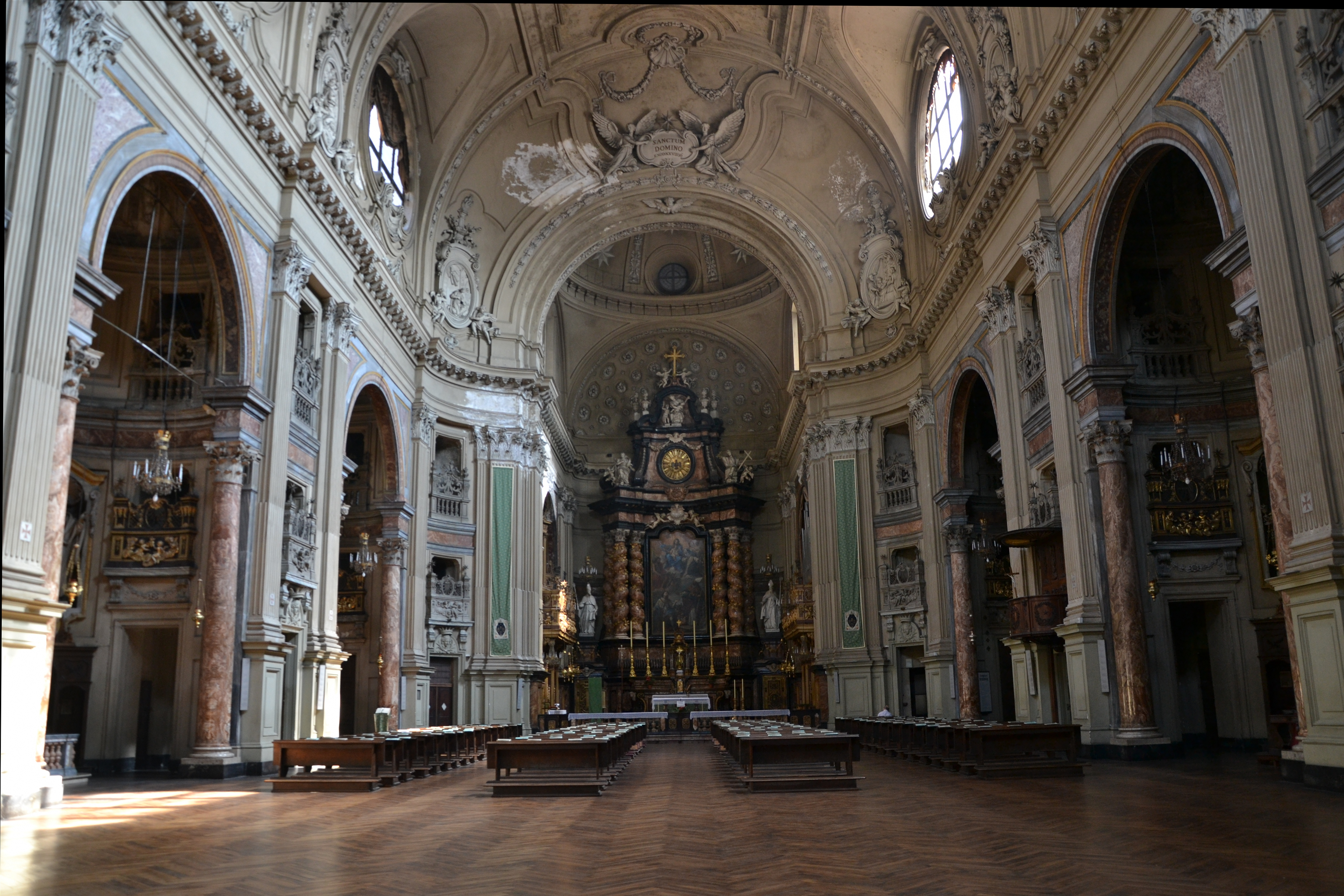 Interno della Chiesa San Filippo Neri a Torino su progetto di Filippo Juvarra (1730)